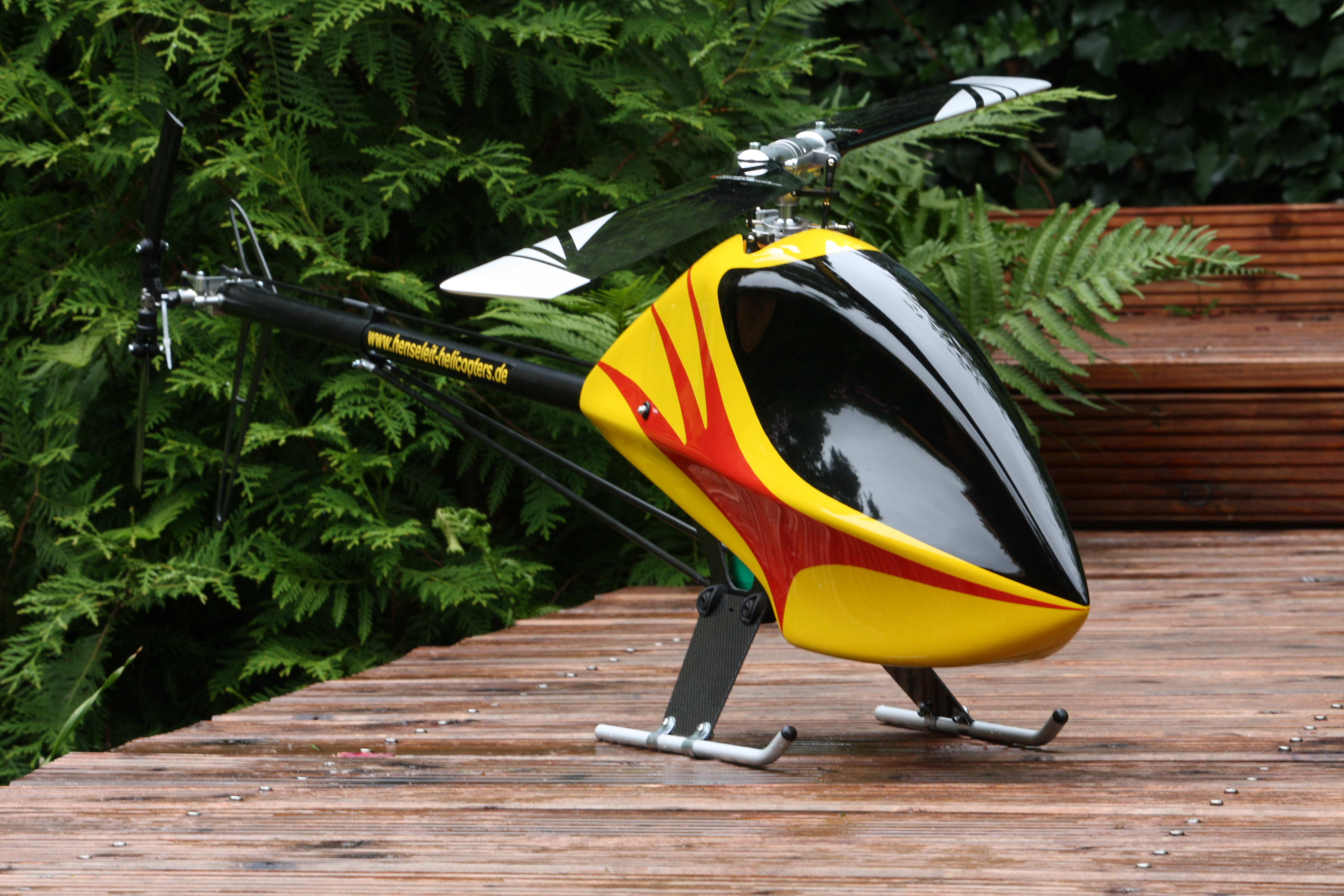 Henseleit TDR Modellhelicopter 2009